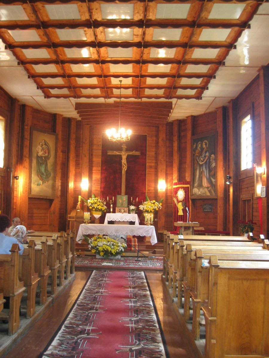 Giełczyn, kościół, ołtarz